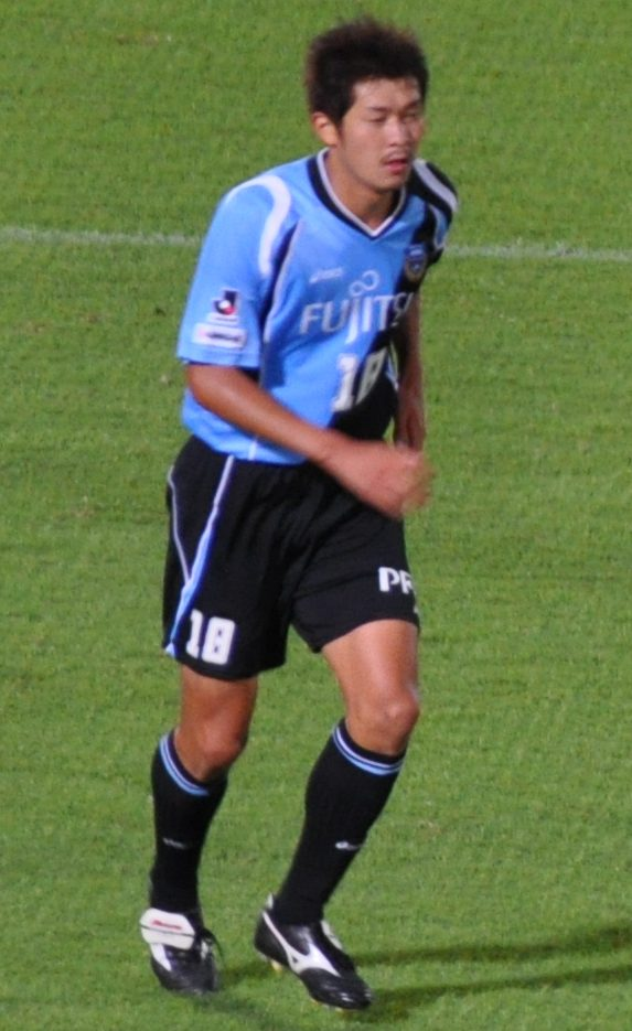 Tomonobu Yokoyama cropped from Kawasaki Frontale vs Gamba Osaka_387